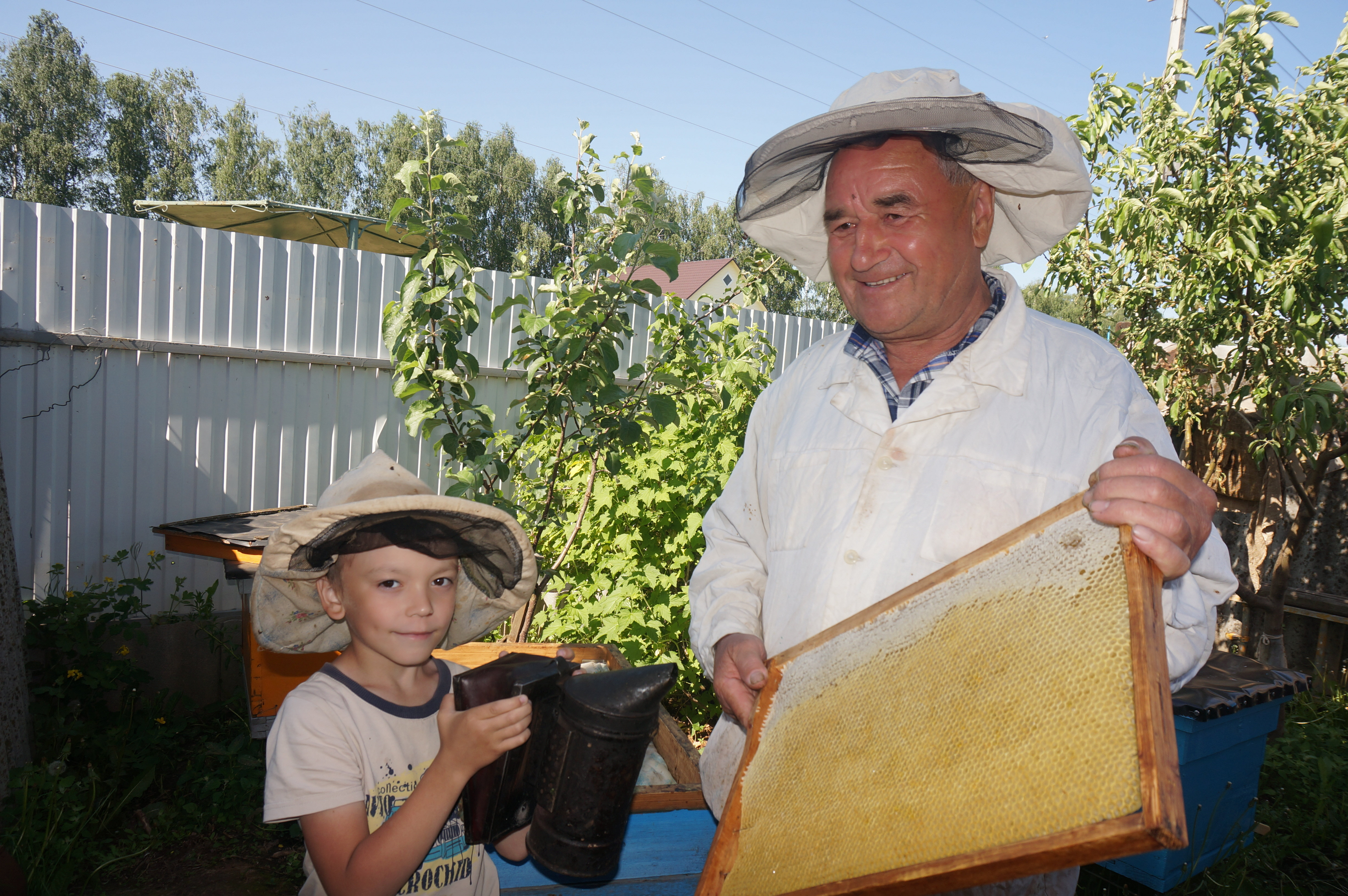 Нефтекамские пчеловоды